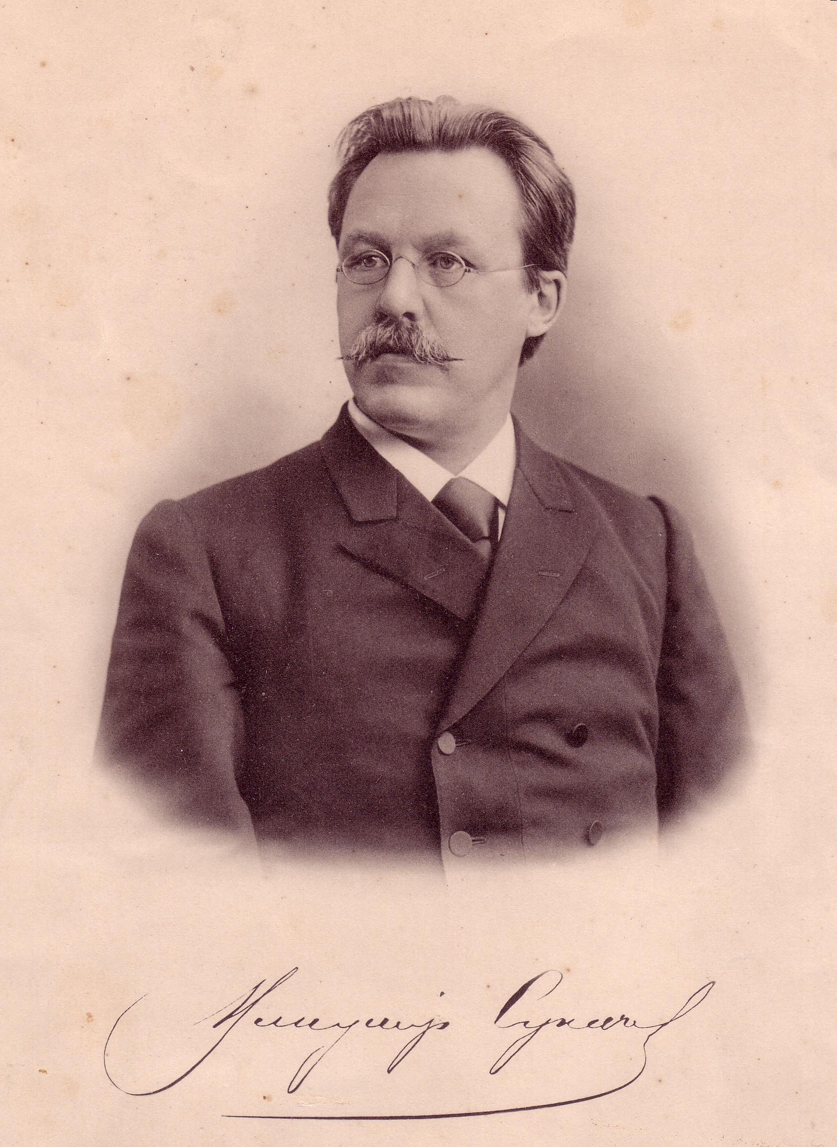 Владимир Платонович Сукачев, общественный деятель второй половины 19 века, городской голова города Иркутска, благотворитель, меценат, коллекционер, создатель Иркутской картинной галереи.